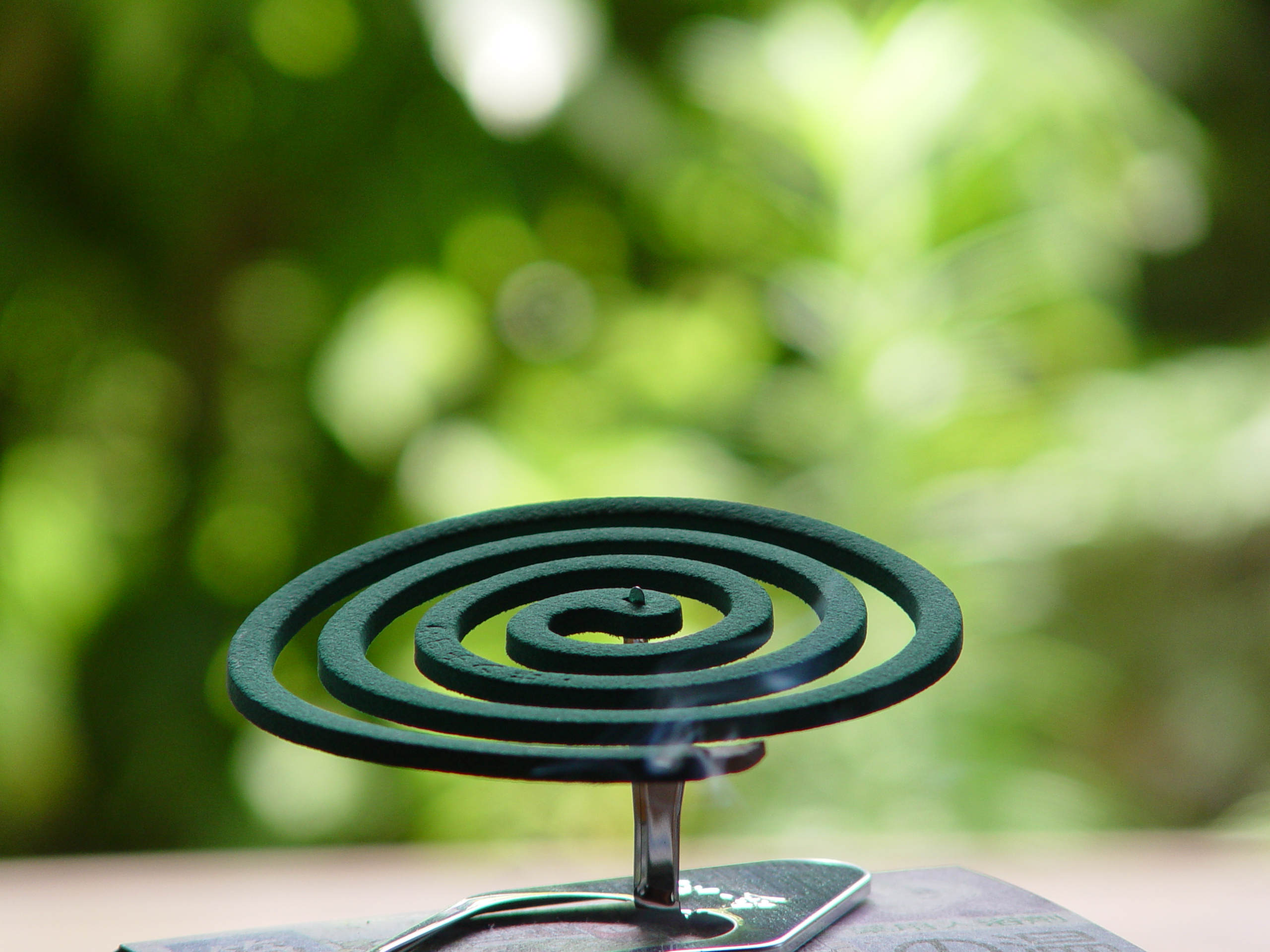 燻る蚊取線香。山口県下関市豊浦町の民家にて。2004年7月中旬撮影。